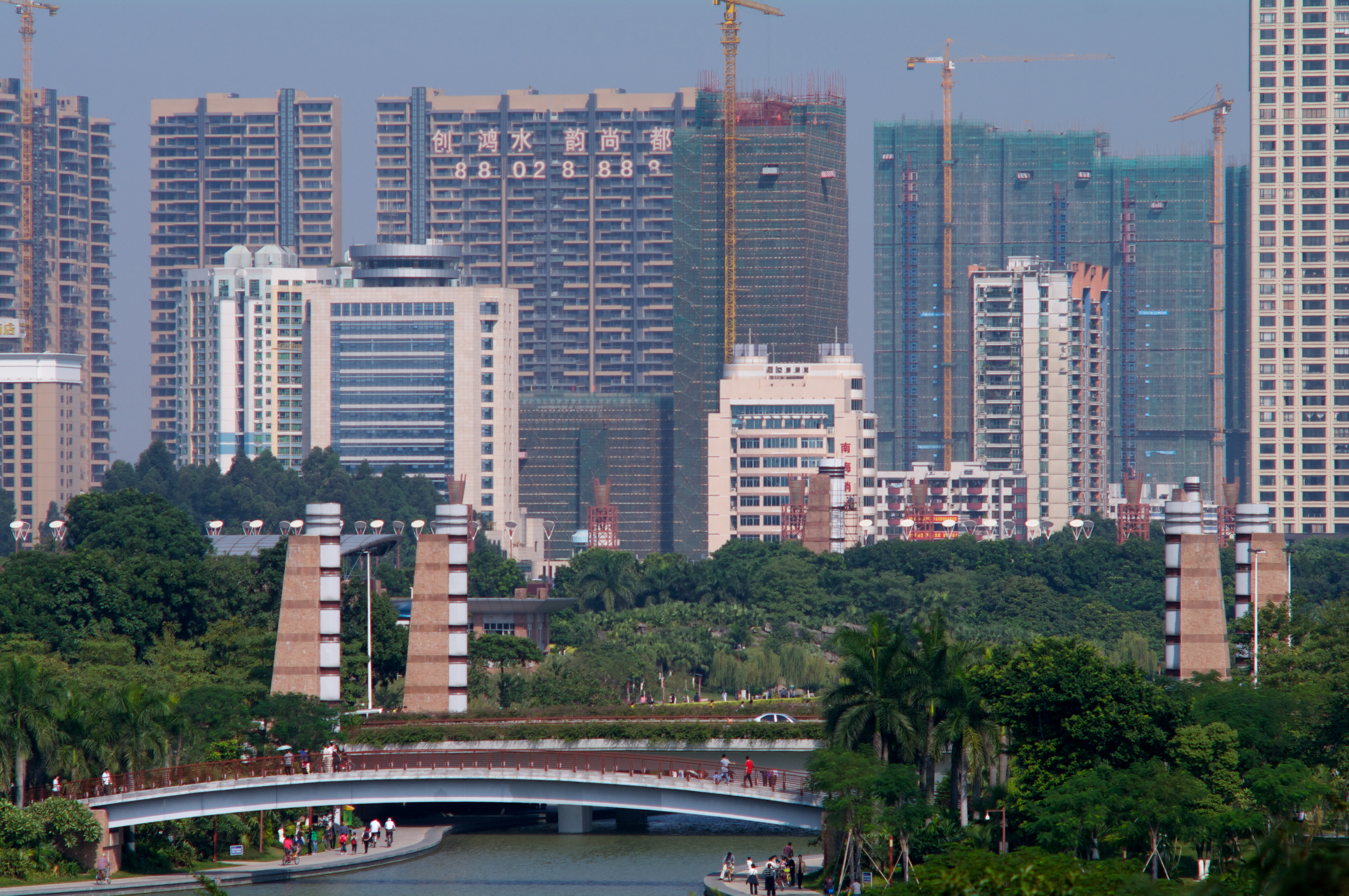 downtown of Guicheng